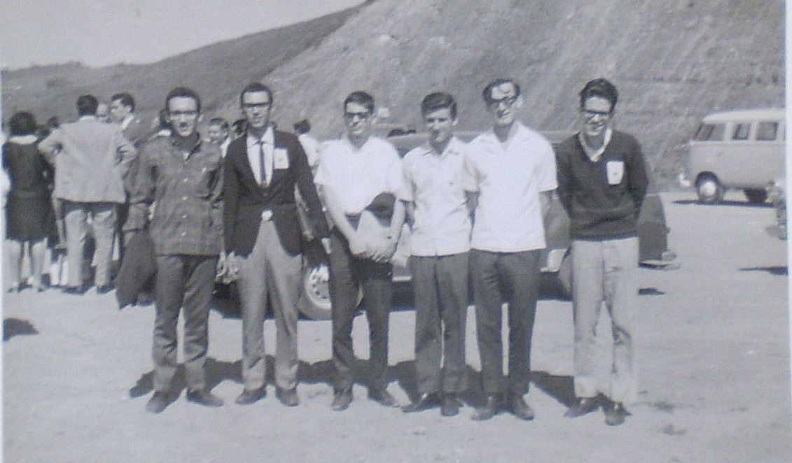 La unua estraro de BEJO: Paulo S. Viana, Wilson Martins, Francisco Wechsler, Umberto Ferreira, Roberto Nogueira e Aloisio Sartorato